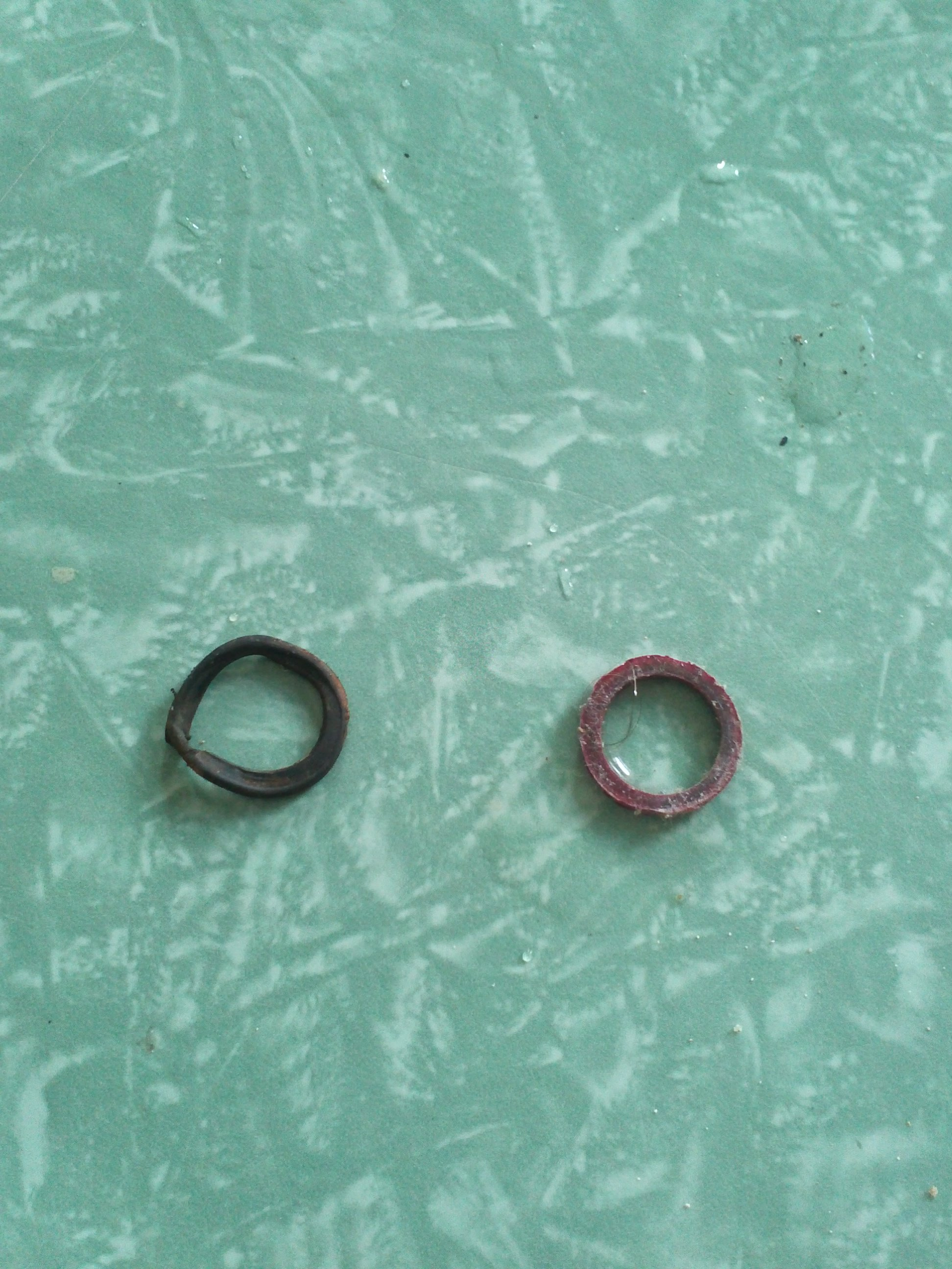 Karma Mora PO 35.